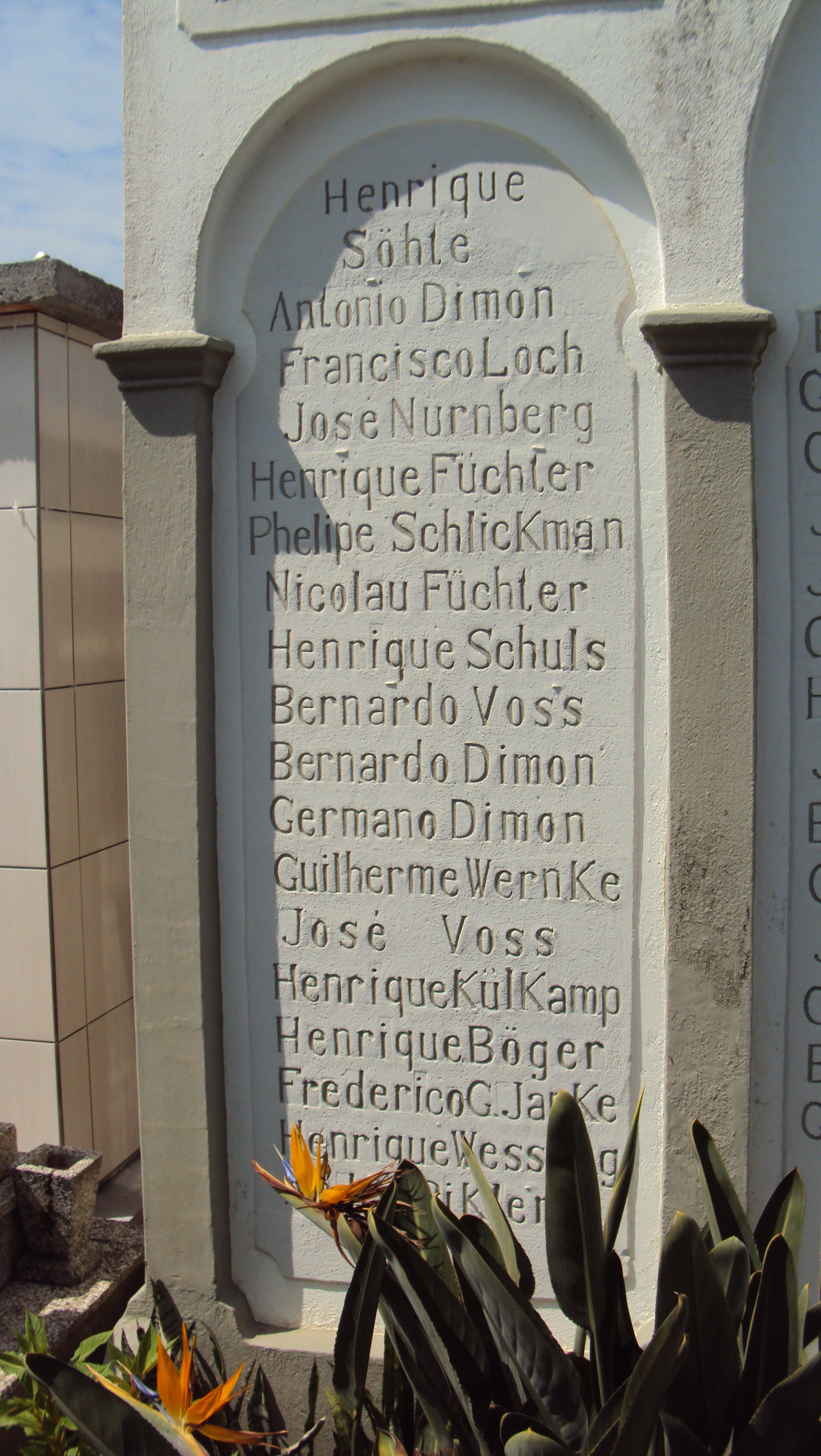 Sepultura coletiva dos imigrantes fundadores da colônia de Braço do Norte